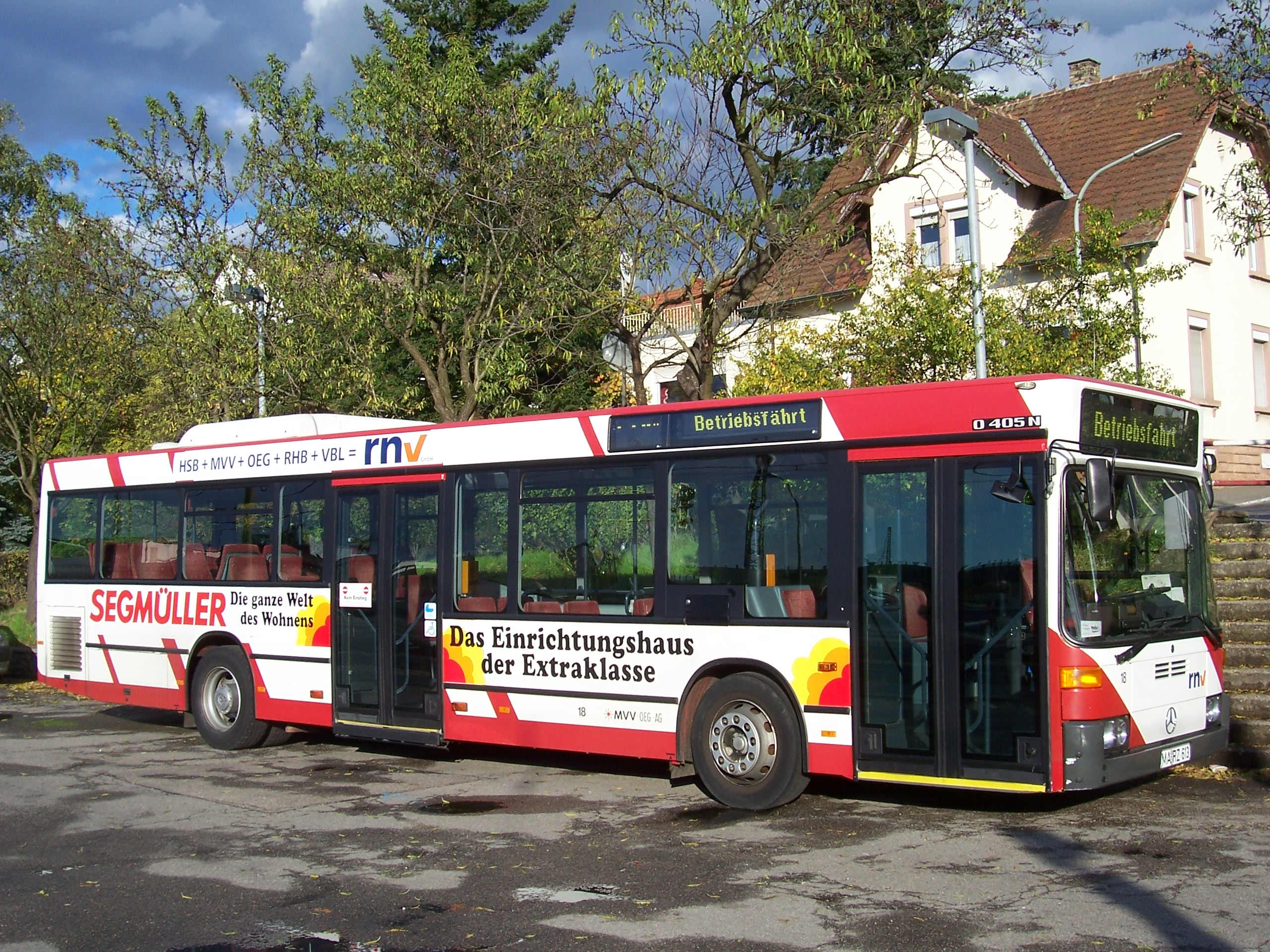 A Mercedes-Benz O 405 N2 in Weinheim an der Bergstraße, Germany My own photo from 23-oct-2005